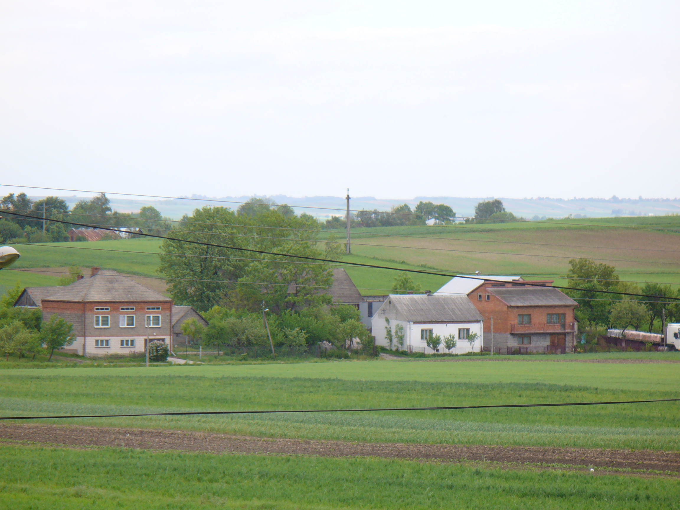 Polanowice (woj. małopolskie).